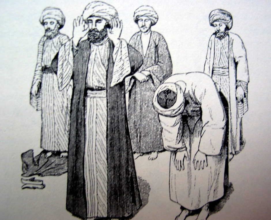 Reproduktion einer Zeichnung aus: E. W. Lane: Manners and Customs of the modern Egyptians. 1836